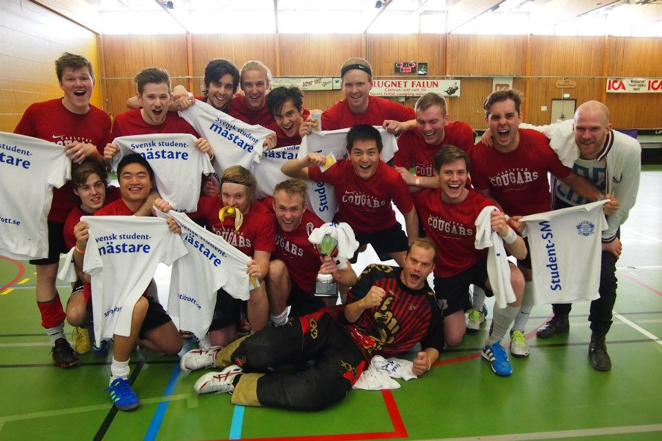 Studentiaden vinnare i innebandy 2013 i Falun. Laget som vann heter Carlstad Cougars.